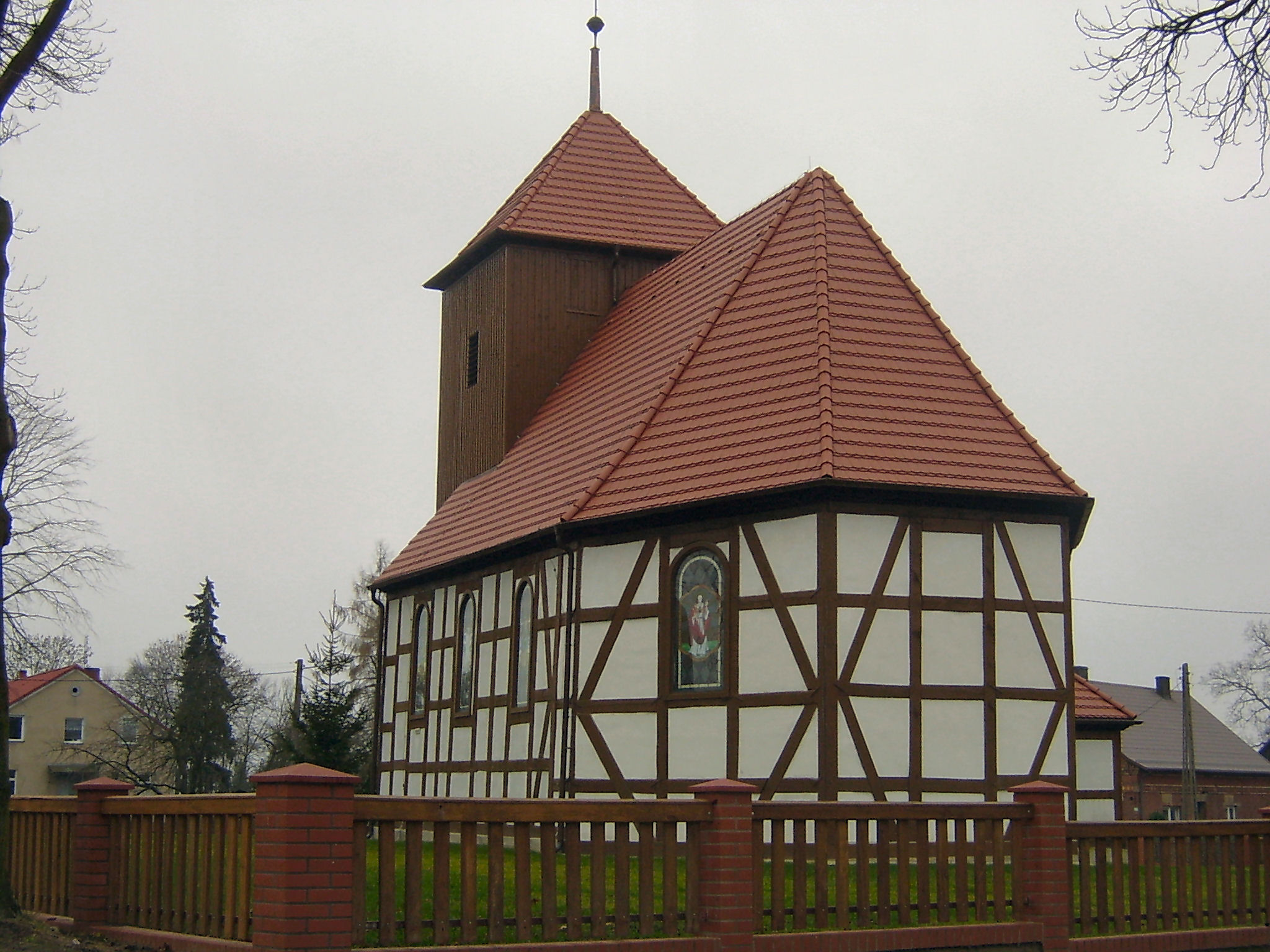 Wysoka - szachulcowy kościół poewangelicki, obecnie rzymskokatolicki filialny pw. św. Mikołaja (1. poł. XVIII w.)